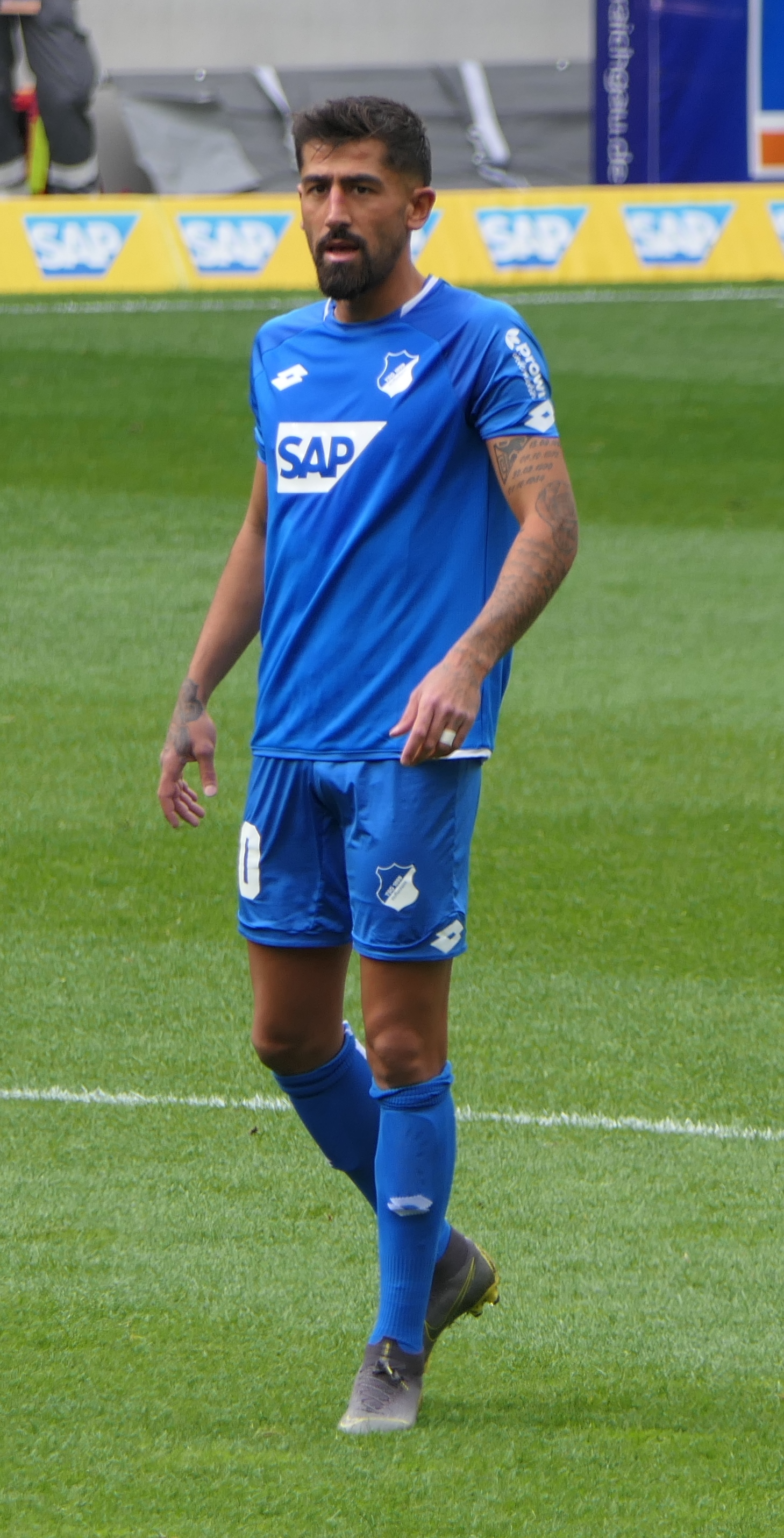 Der Fussballprofi Kerem Demirbay im Trikot der TSG 1899 Hoffenheim beim Heimspiel gegen den SV Werder Bremen am 11.05.2019.